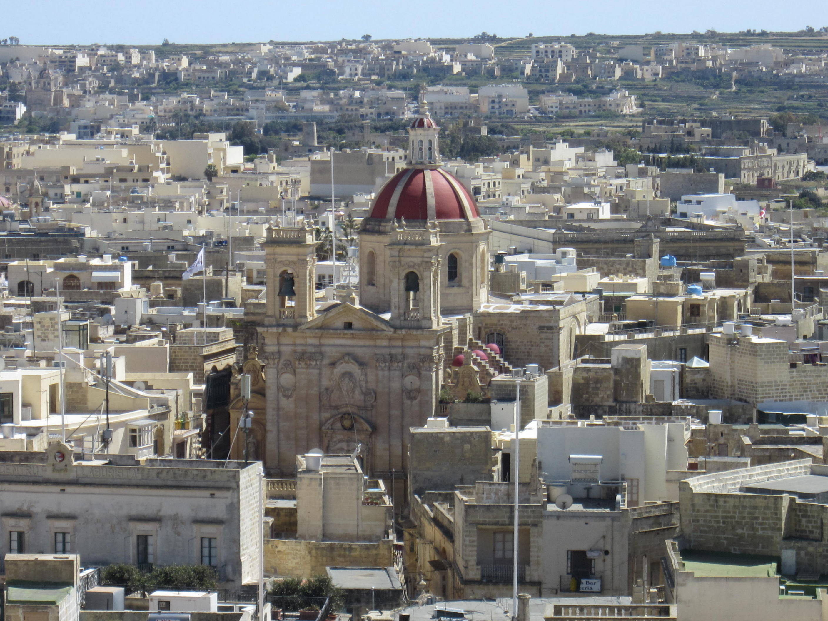 Veduta della città di Victoria dalla Cittadella Fortificata. Si nota la Basilica di san Giorgio